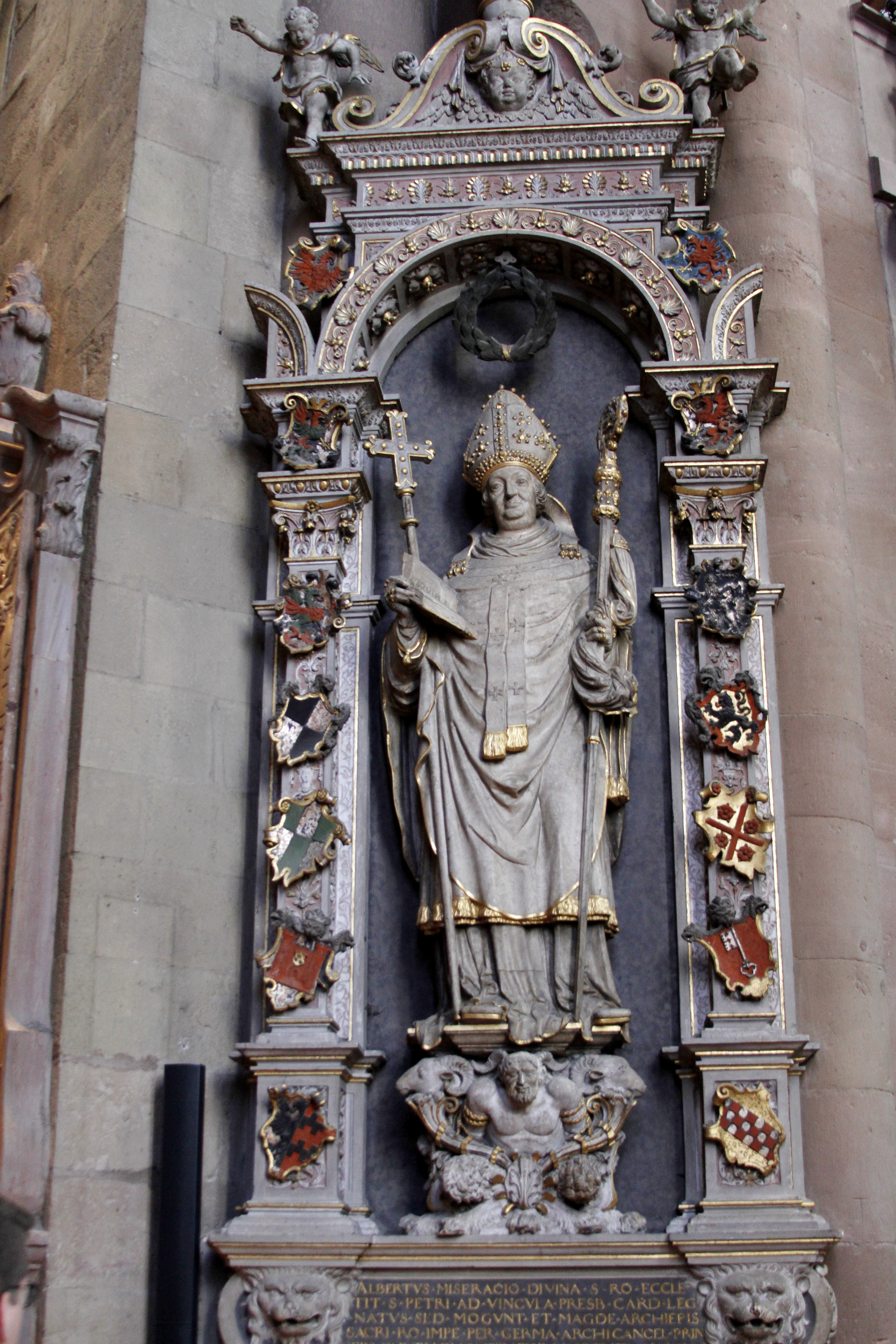 Mainz Cathedral - Mainz - Germany